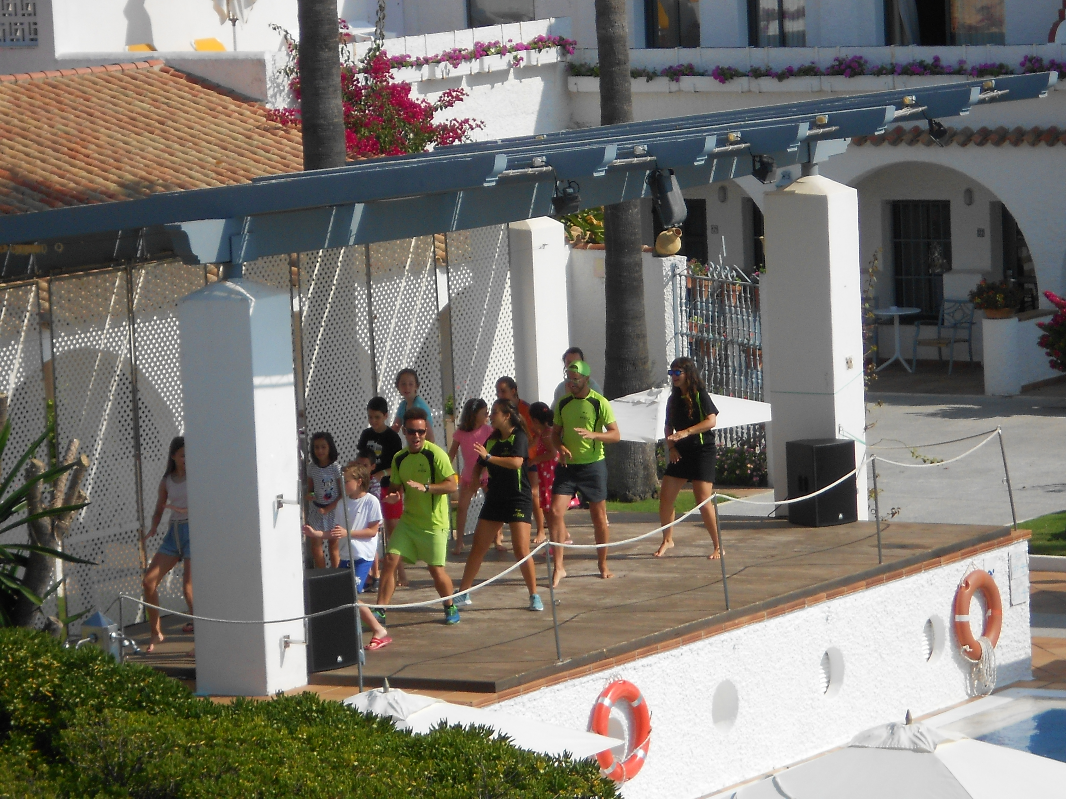 Animateure tanzen mit Kindern in einem Hotel in Rota, Spanien